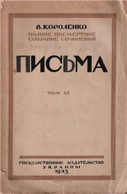 В. Г. Короленко. Полное посмертное собрание сочинений. Т. LI. Письма. Книга 2. — Государственное издательство Украины, 1923.